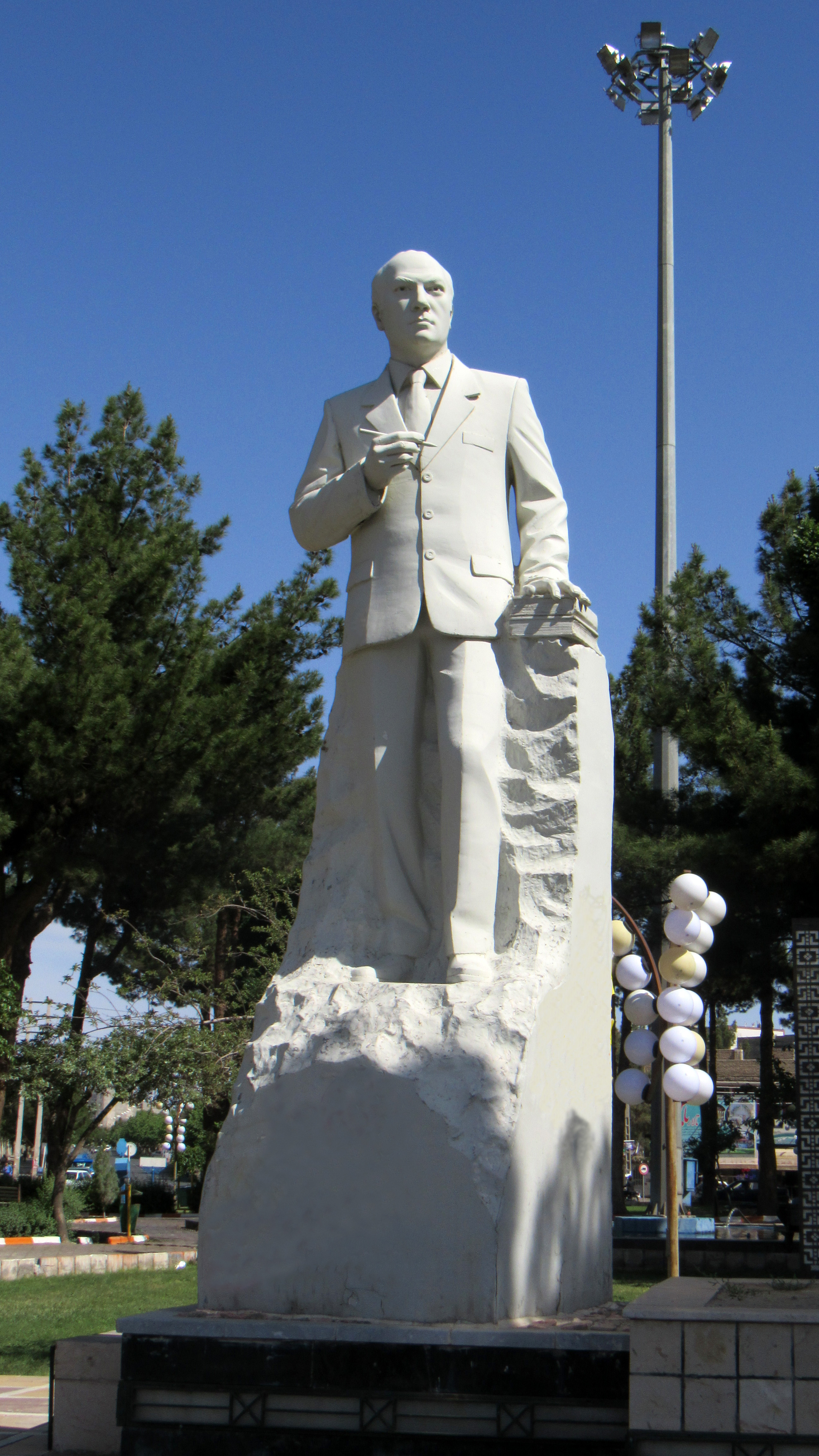 تندیس دکتر علی شریعتی در میدان دکتر شریعتی سبزوار